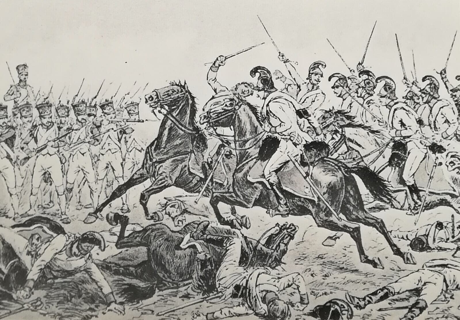 Charge de la cavalerie autrichienne du prince de Liechtenstein contre le 10e régiment d'infanterie de ligne (division Seras) à la bataille de Wagram. Ce régiment participe au mouvement de la colonne Macdonald contre le village d'Aderklaa.